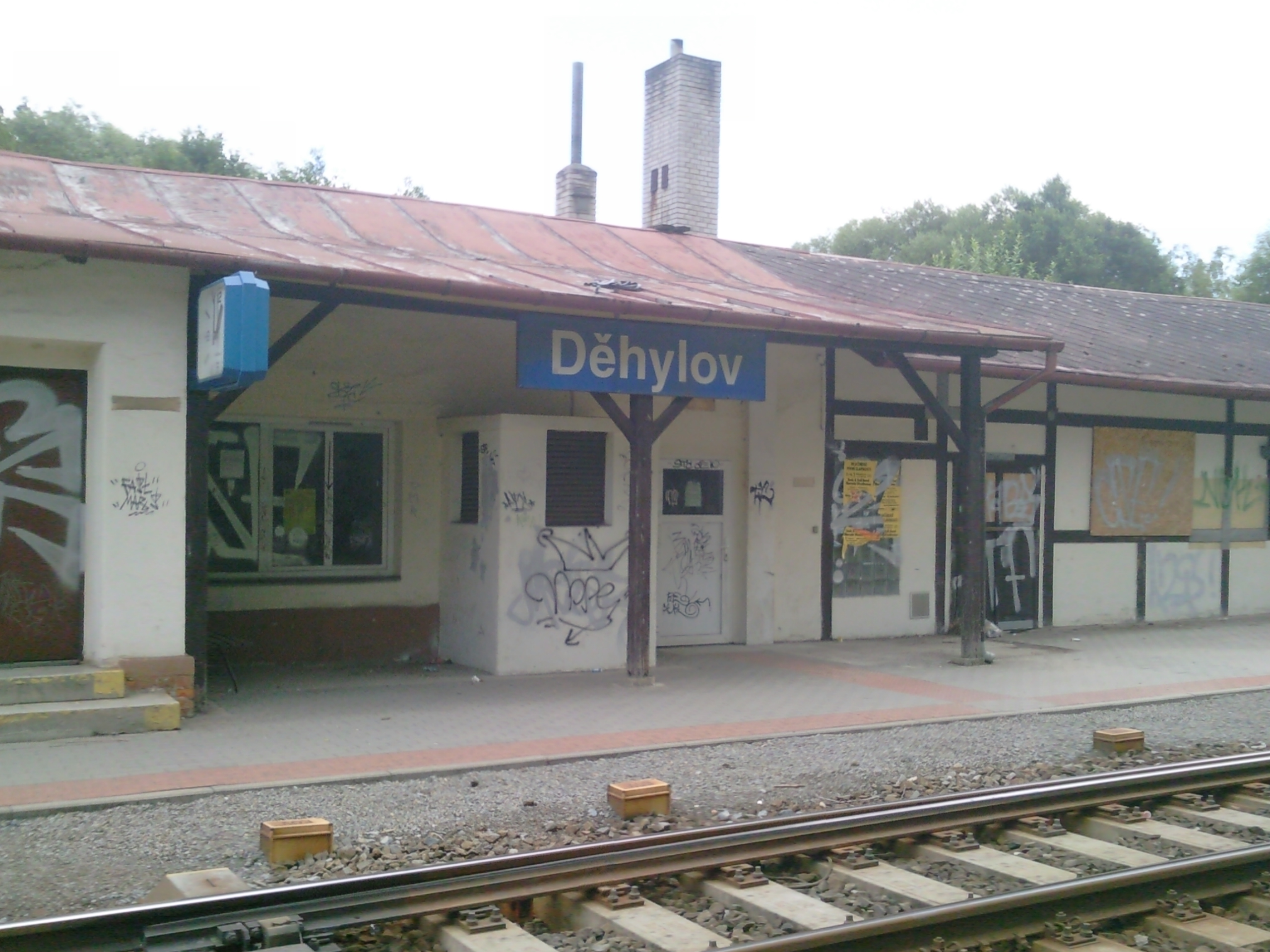 Děhylov